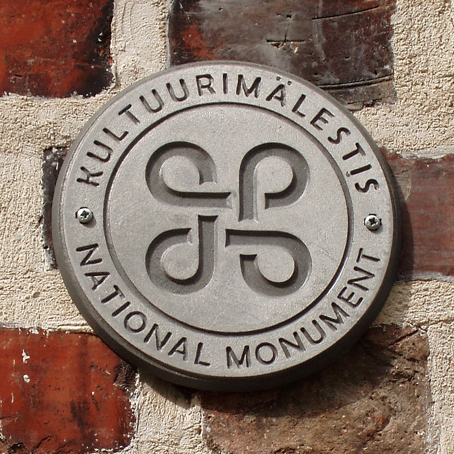 Eesti kultuurimälestise logo Tartu Jaani kiriku seinal.